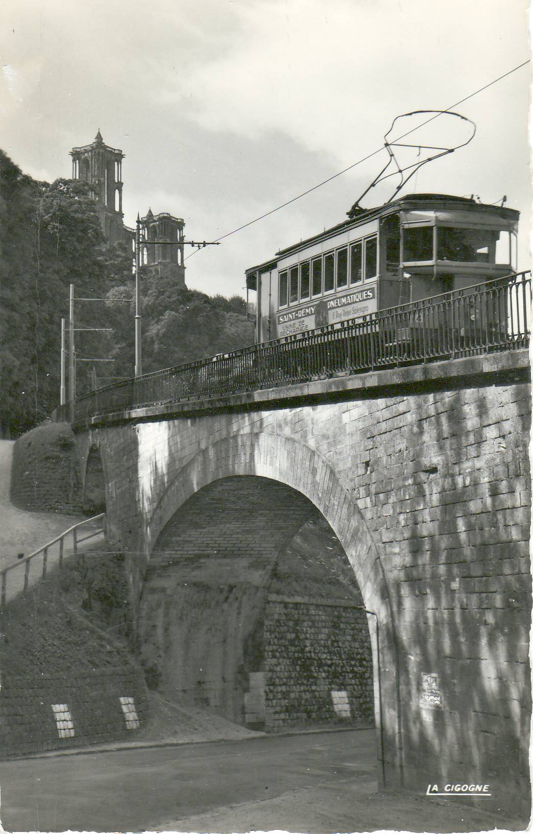 Carte postale ancienne éditée par CIGOGNE, n° 02.408.41 : Le Viaduc